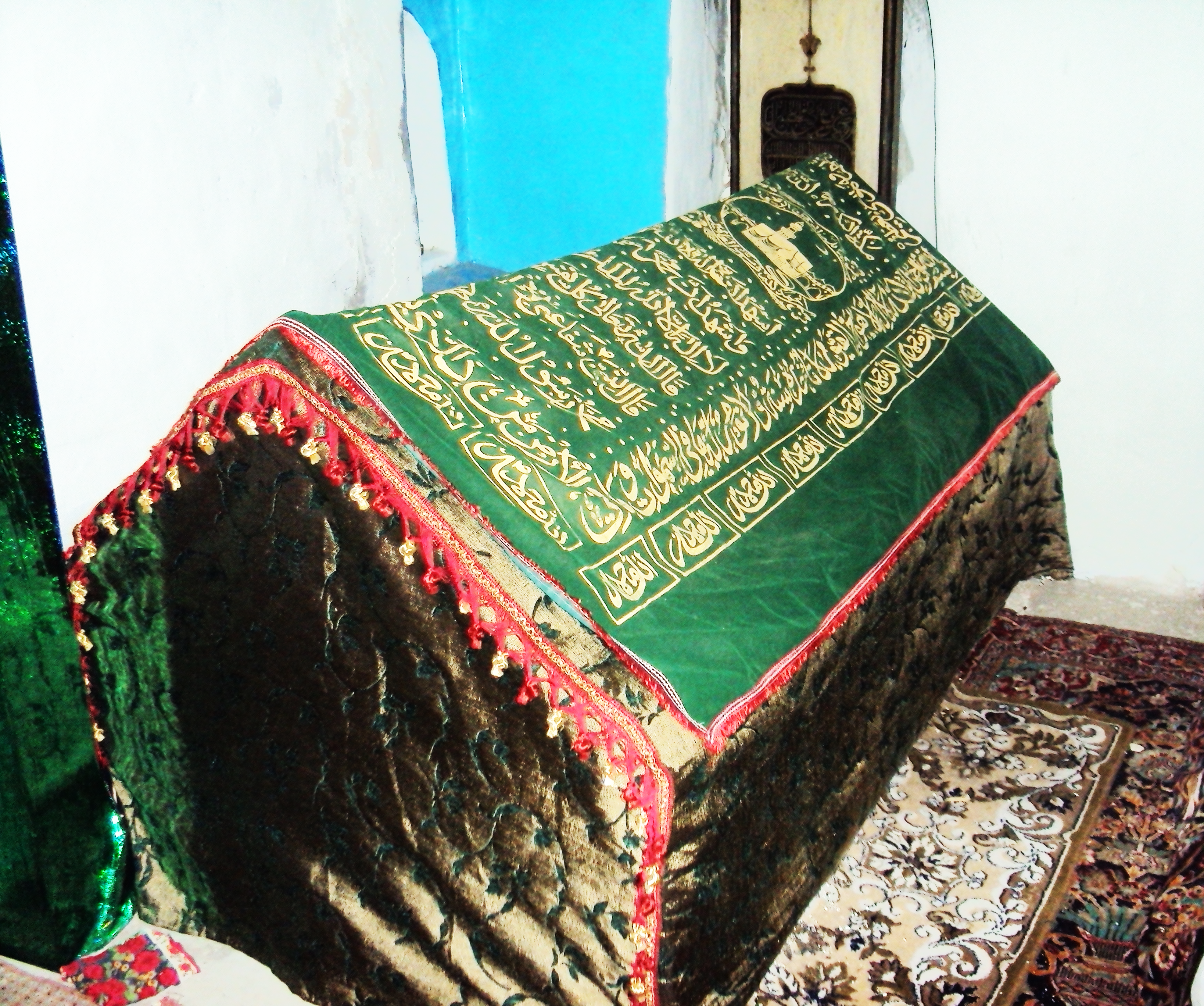 Гробница Имама Газимухаммада в Гимрах